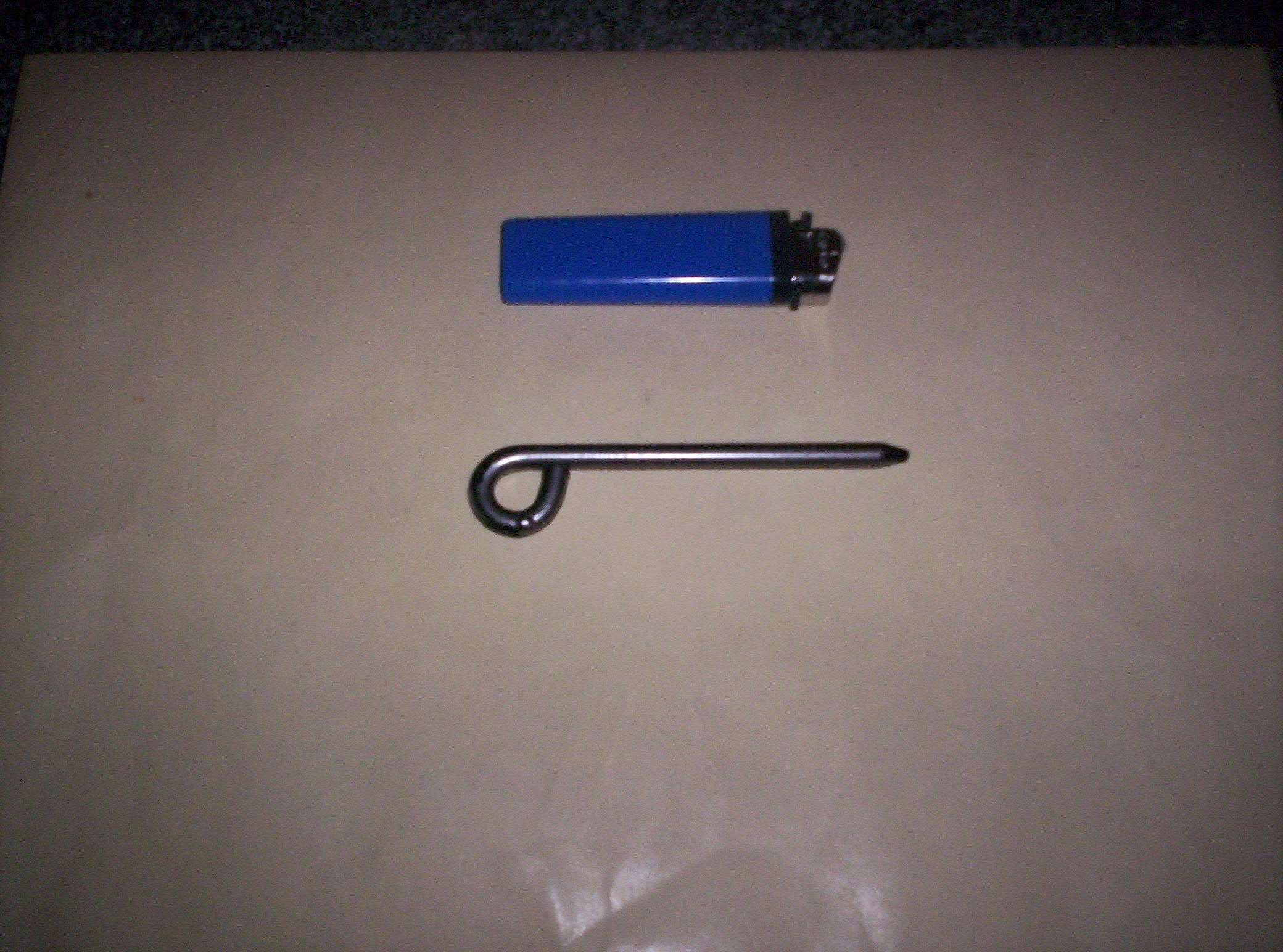 Een krommer zoals gebruikt in de theatertechniek